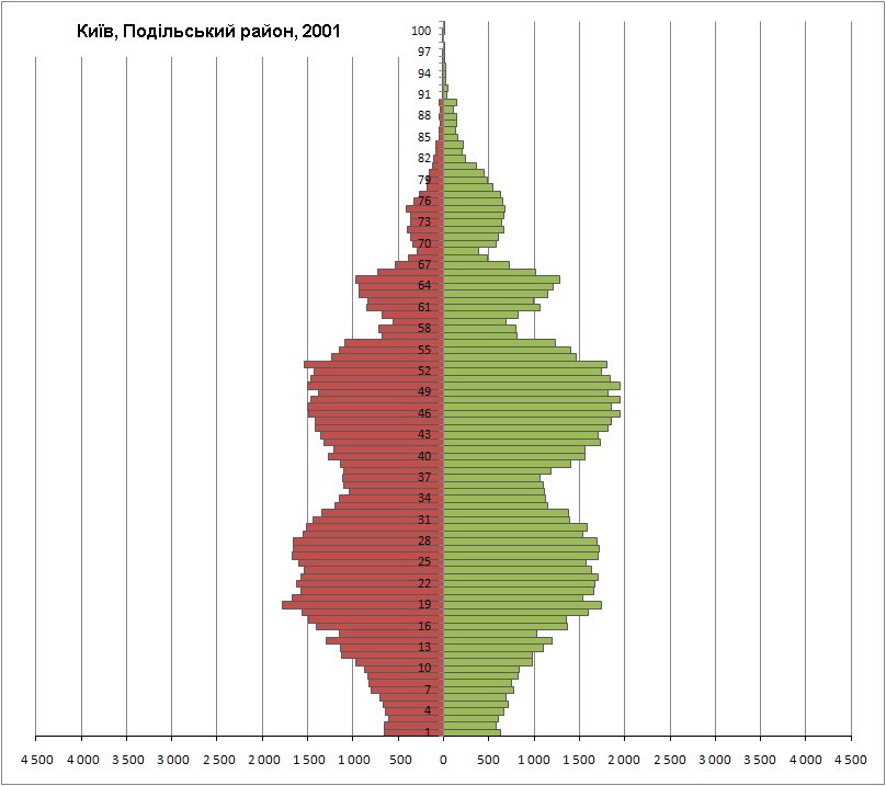 Статево-вікова піраміда населення Подільського району Києва за переписом 2001 р.